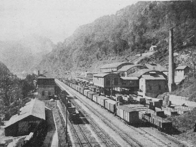 Separacija v Trbovljah